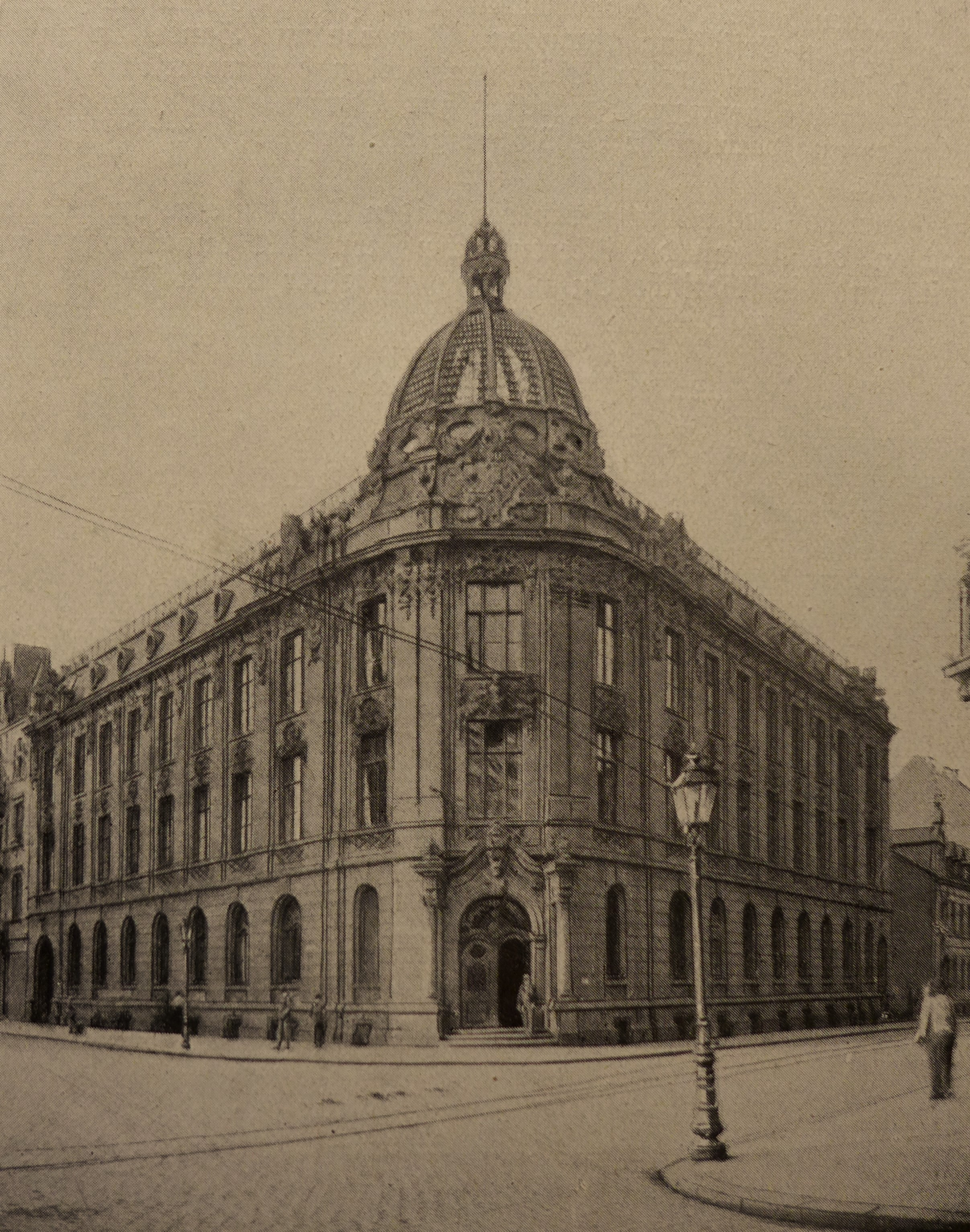 Postamt St. Johann, Foto um 1900